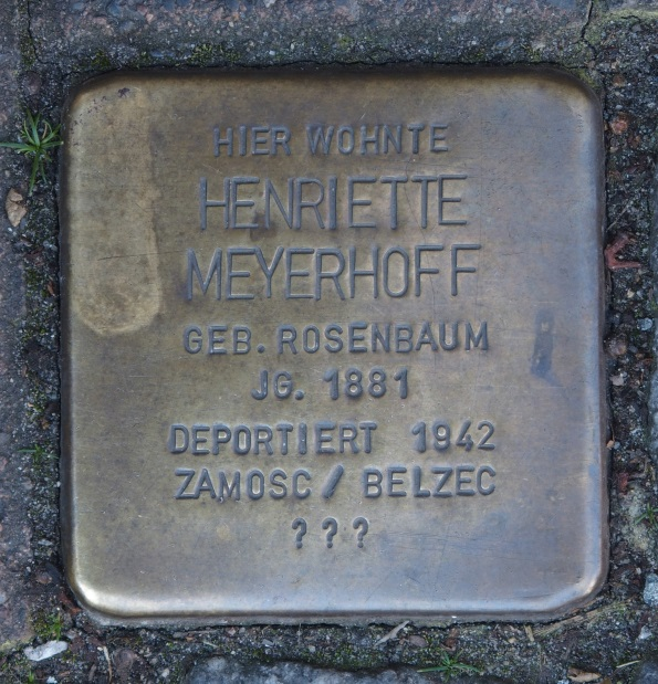 Stolperstein in Soest Kohlbrink 7, Henriette Meyerhoff